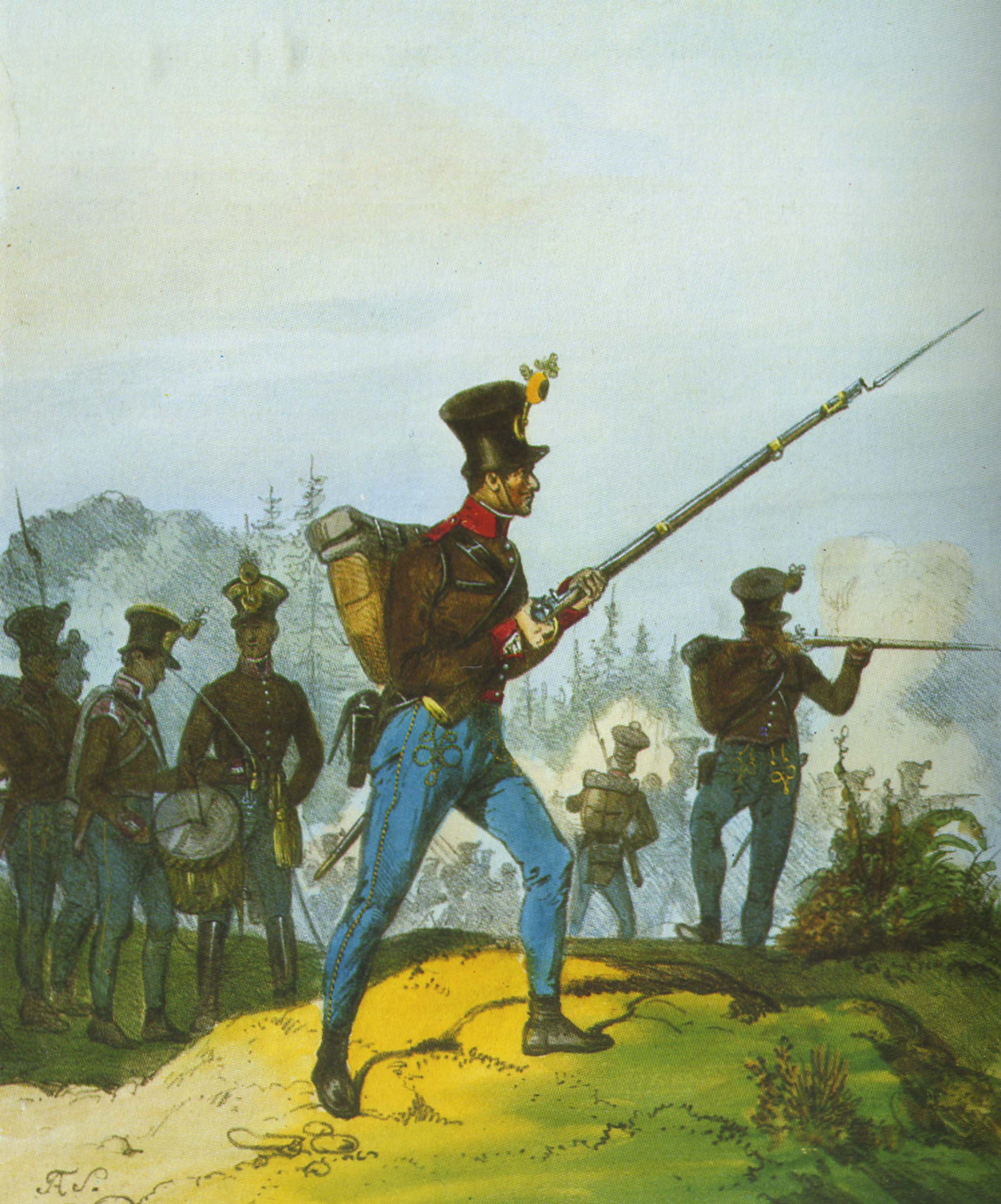 Soldat des 11. Grenzinfanterie-Regiments Österreich-Ungarns